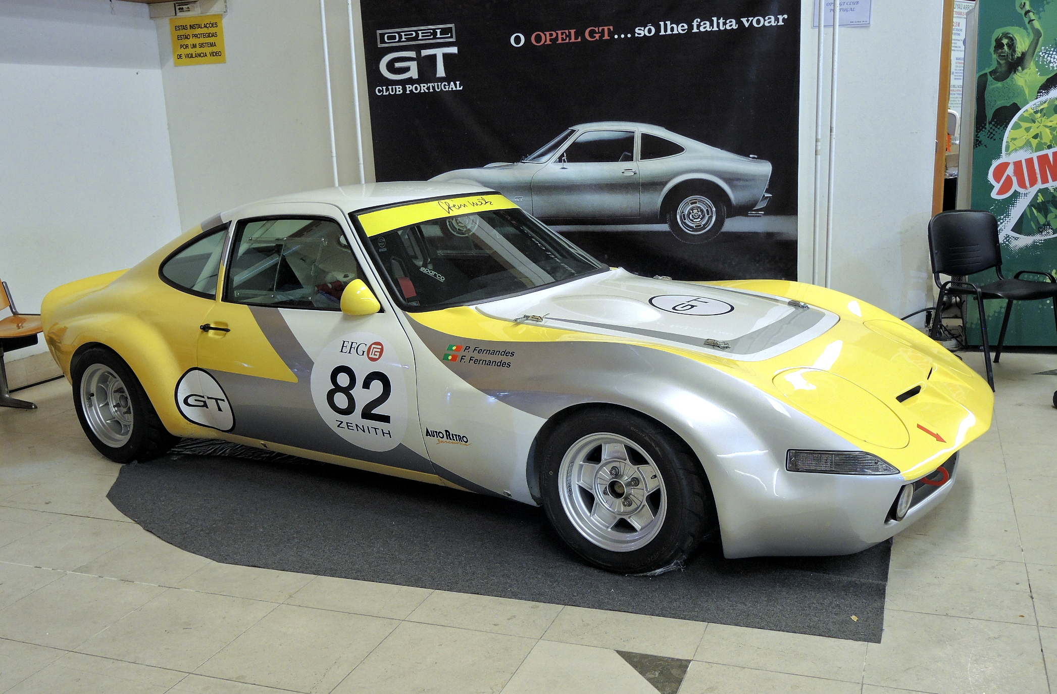 autoClássico Porto 2016. Oporto, Portugal, octubre 2016